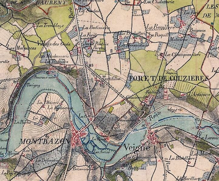 Veignésur la carte d'État major de 18661866